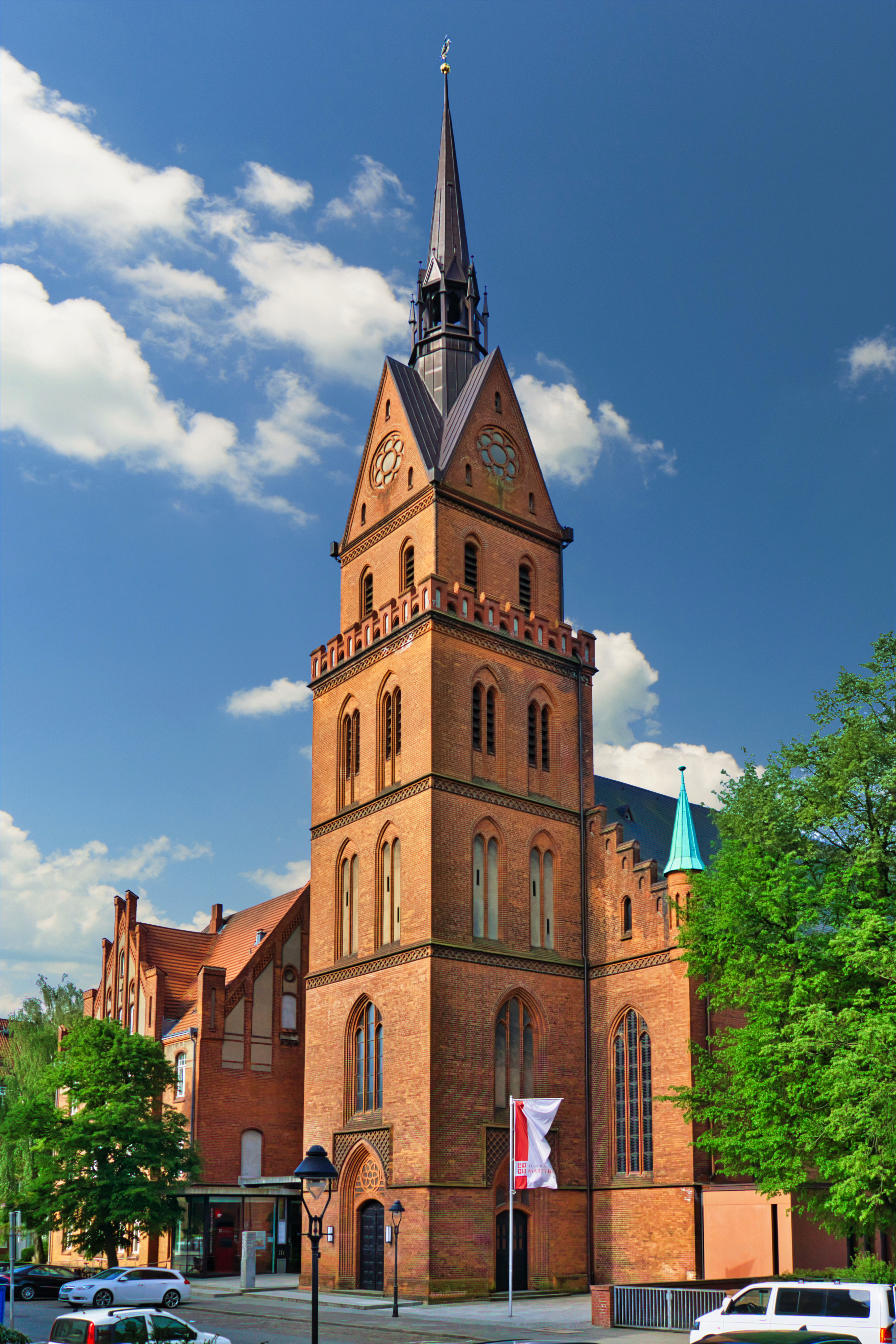 Kirchturm der katholischen Herz-Jesu-Kirche in Lübeck, von Nordosten aus gesehen